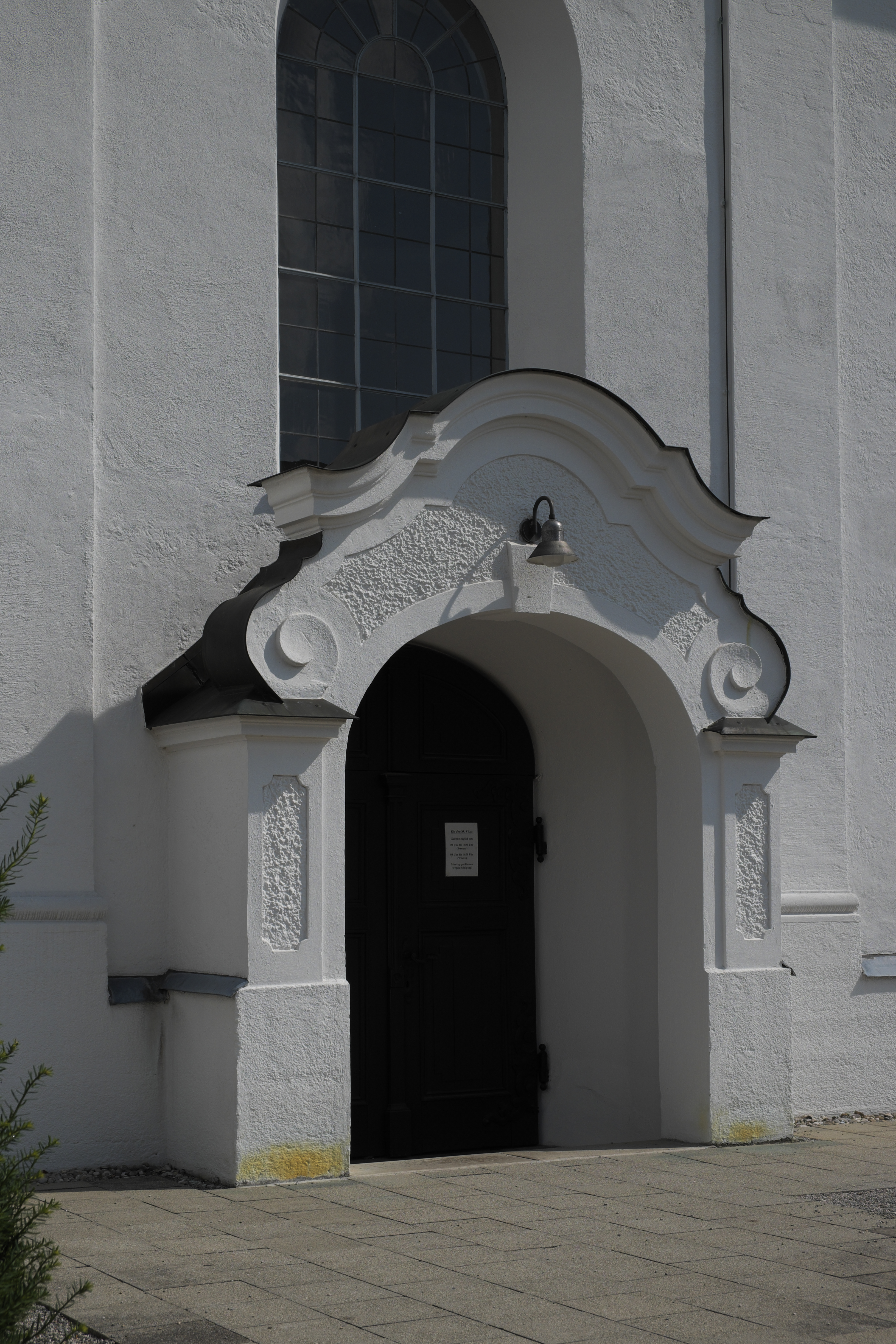 Katholische Pfarrkirche St. Vitus in Maisach im Landkreis Fürstenfeldbruck (Bayern/Deutschland), Vorzeichen